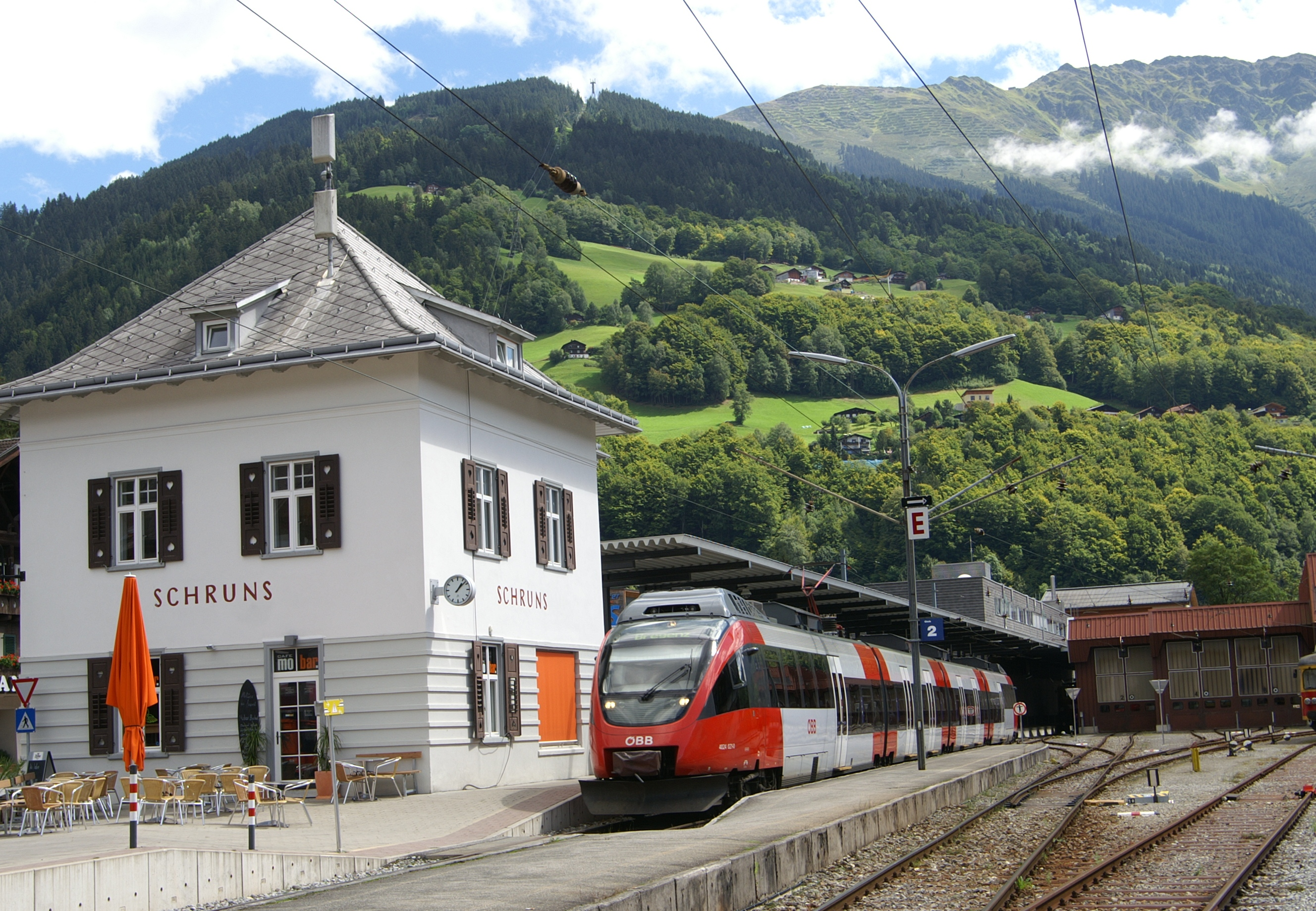 Bahnhof Schruns, Montafon, mit einem Nahverkehrszug der Reihe 4024